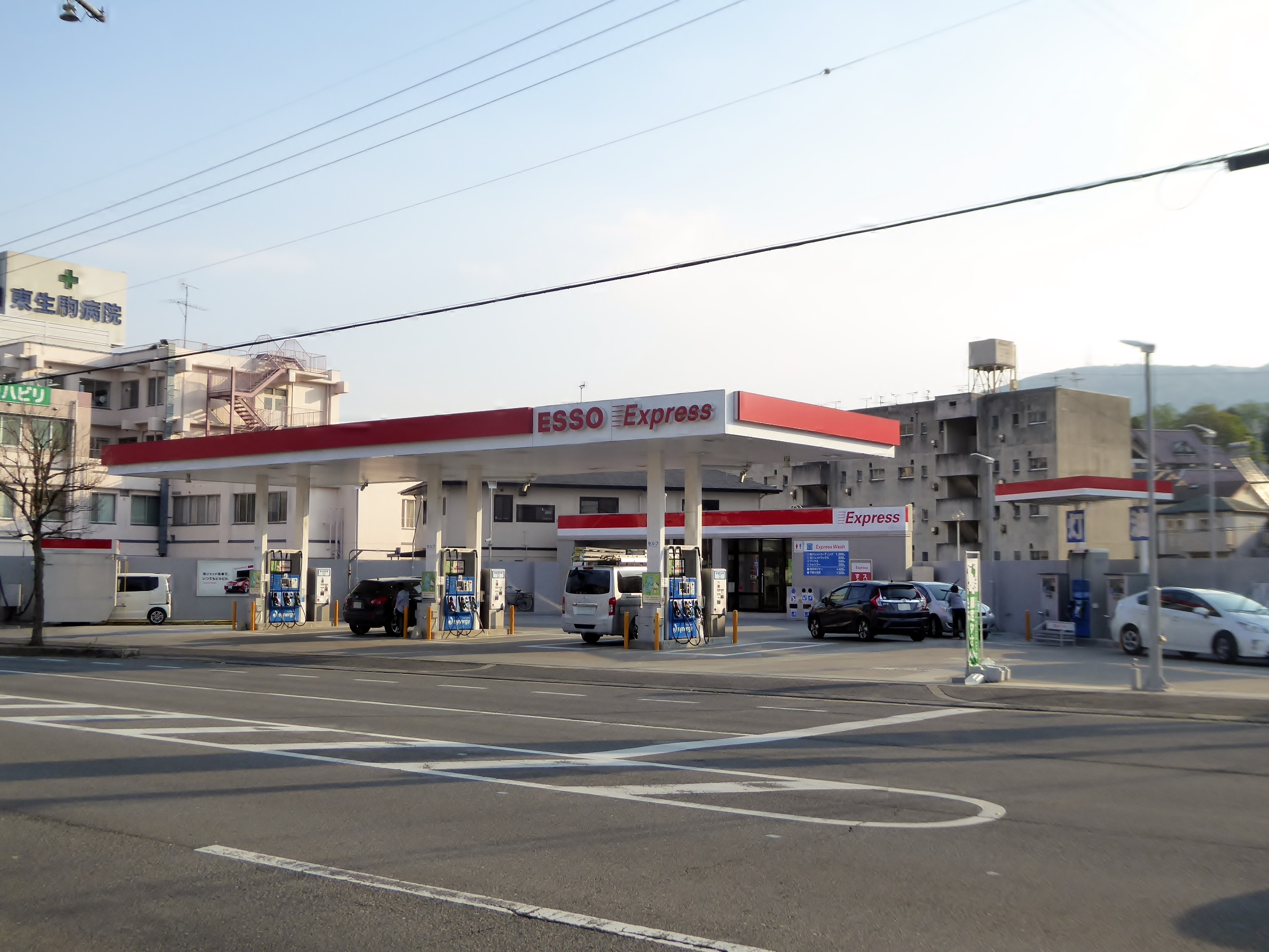 エッソエクスプレス東生駒SSを撮影。